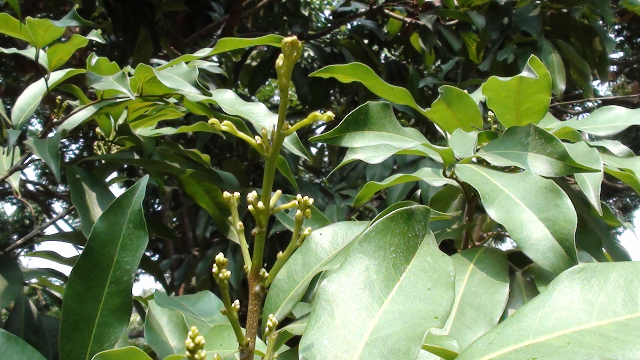 中文（中国大陆）: 荔枝树树枝新芽（中国深圳大南山）